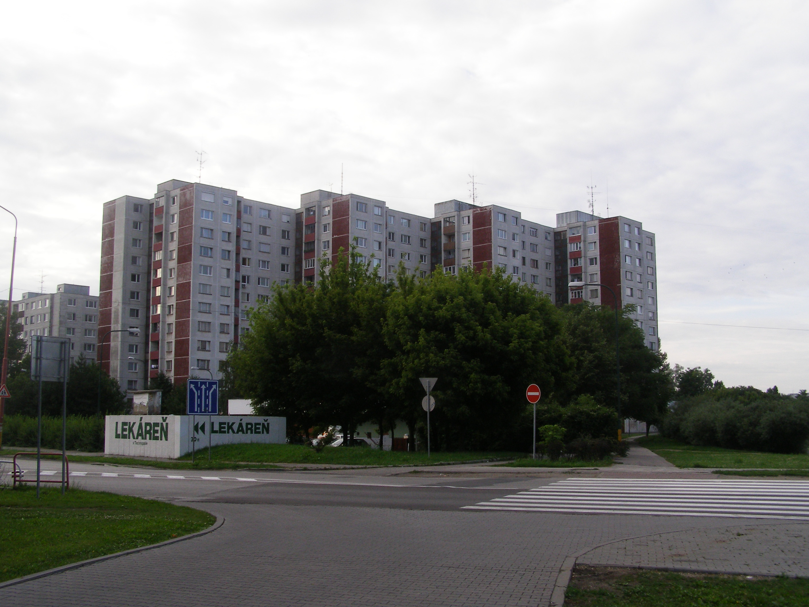 Tematínska street, Petržalka, Bratislava